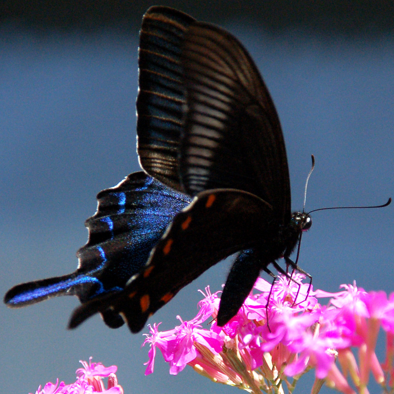 Papilio bianor May 21, 2006 at 13:34 JST, Yanaka